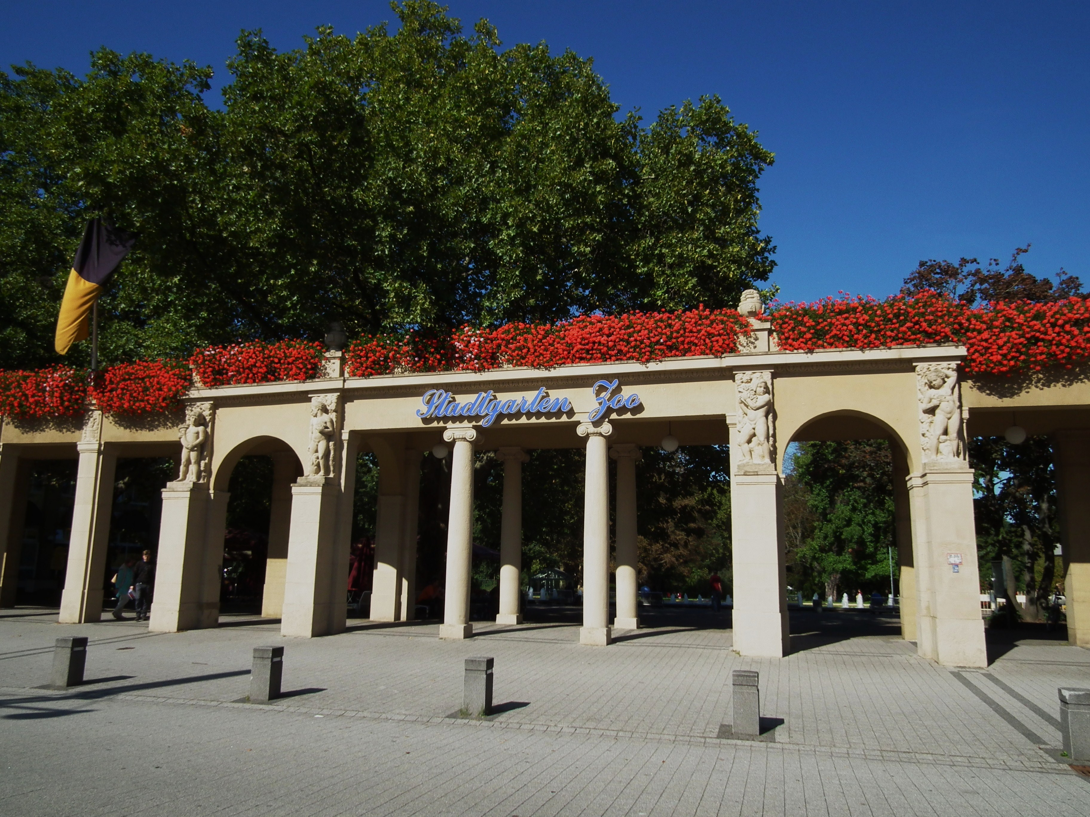 Südliches Eingangsportal zu Stadtgarten und Zoo in Karlsruhe (Baden-Württemberg, Deutschland)